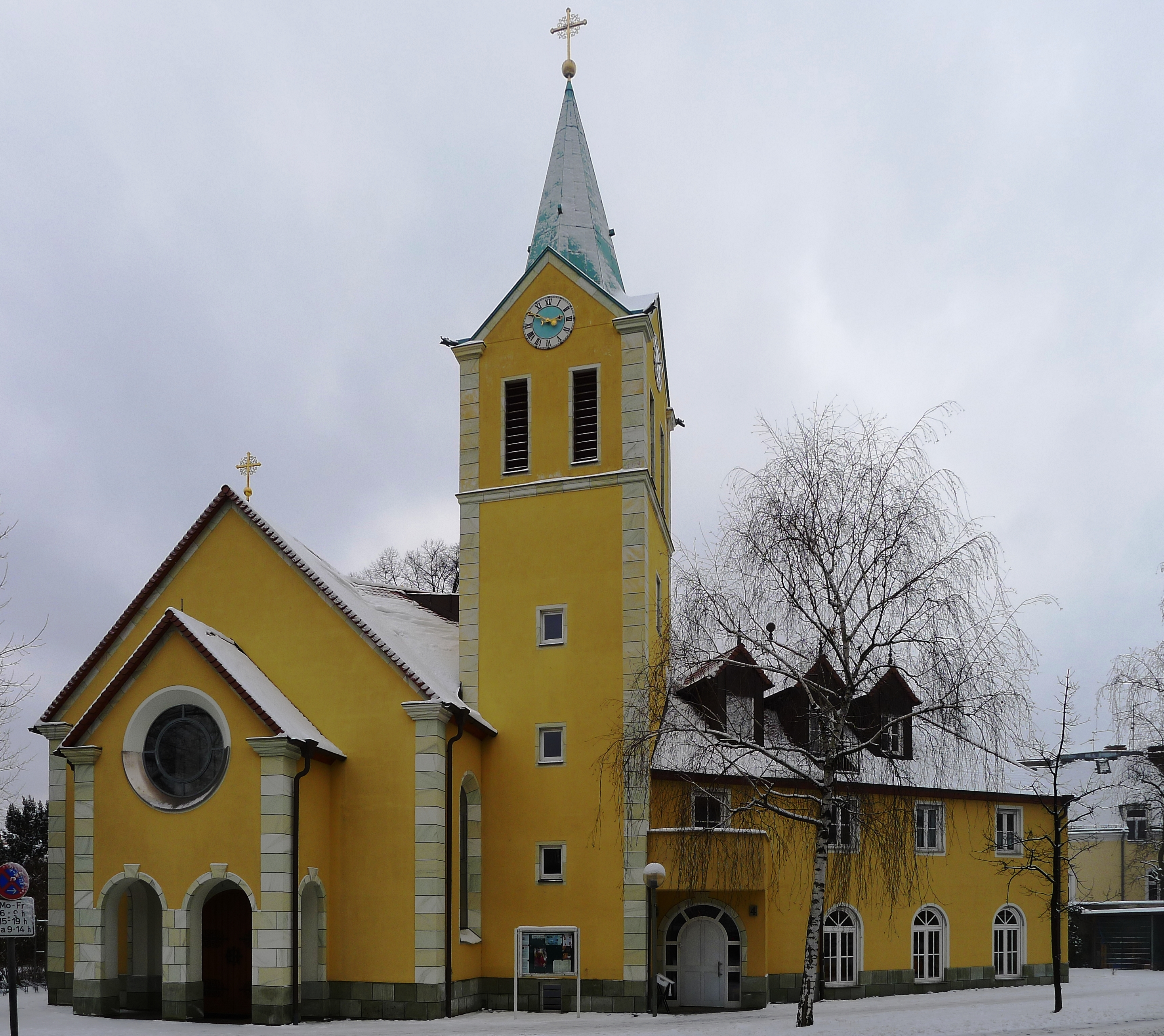 Blick auf das Portal, den Turm und Anbau